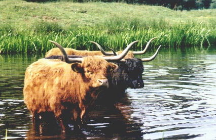 Drei Highland-Kühe beim Bade, NSG „Haselünner Kuhweide“ in Haselünne, Emsland.